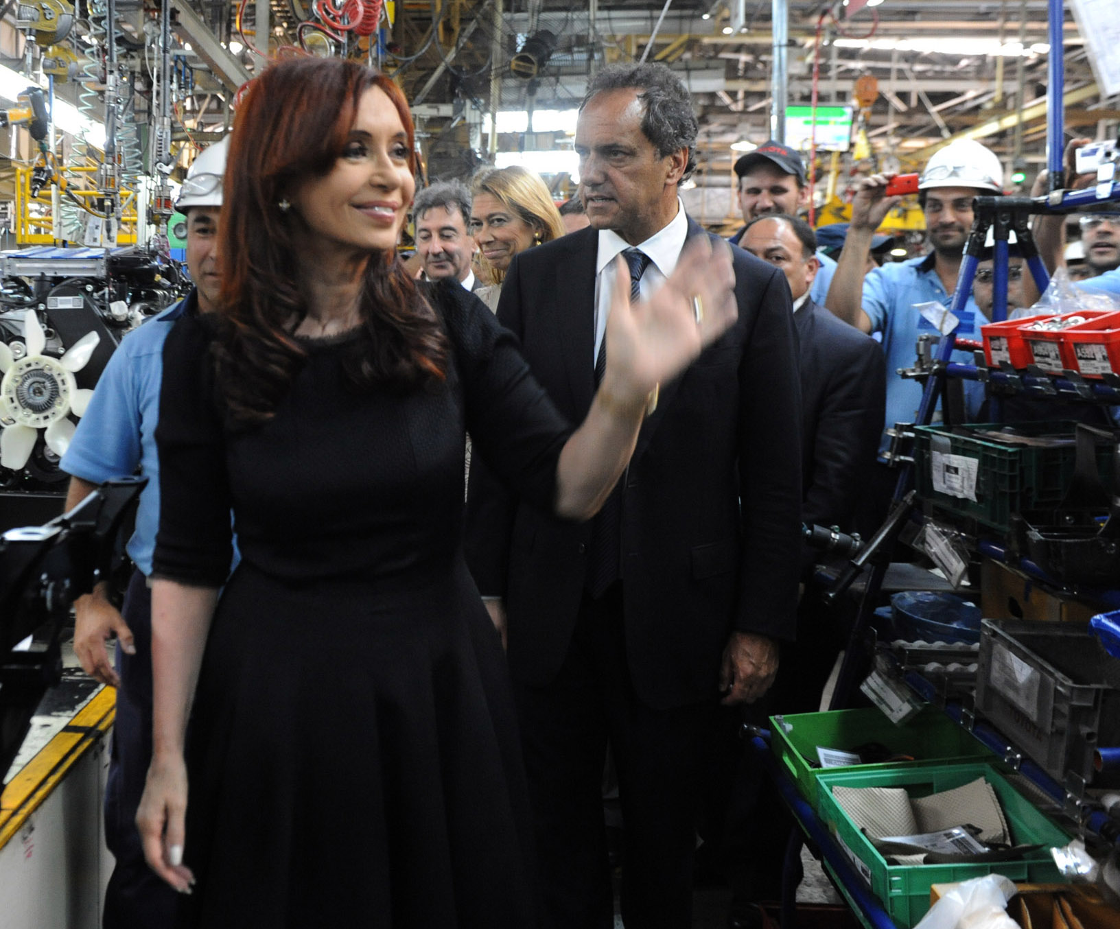 Cristina Fernández recorre la planta Toyota de Zárate junto al gobernador Daniel Scioli, la ministra de Industria, Débora Giorgi y el presidente de Toyota Argentina, Daniel Herrero.